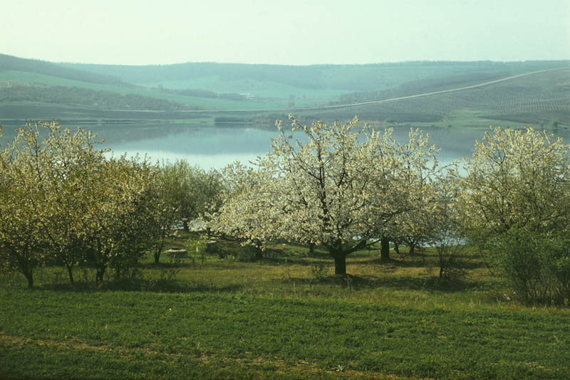 Anenii Noi district (1980).